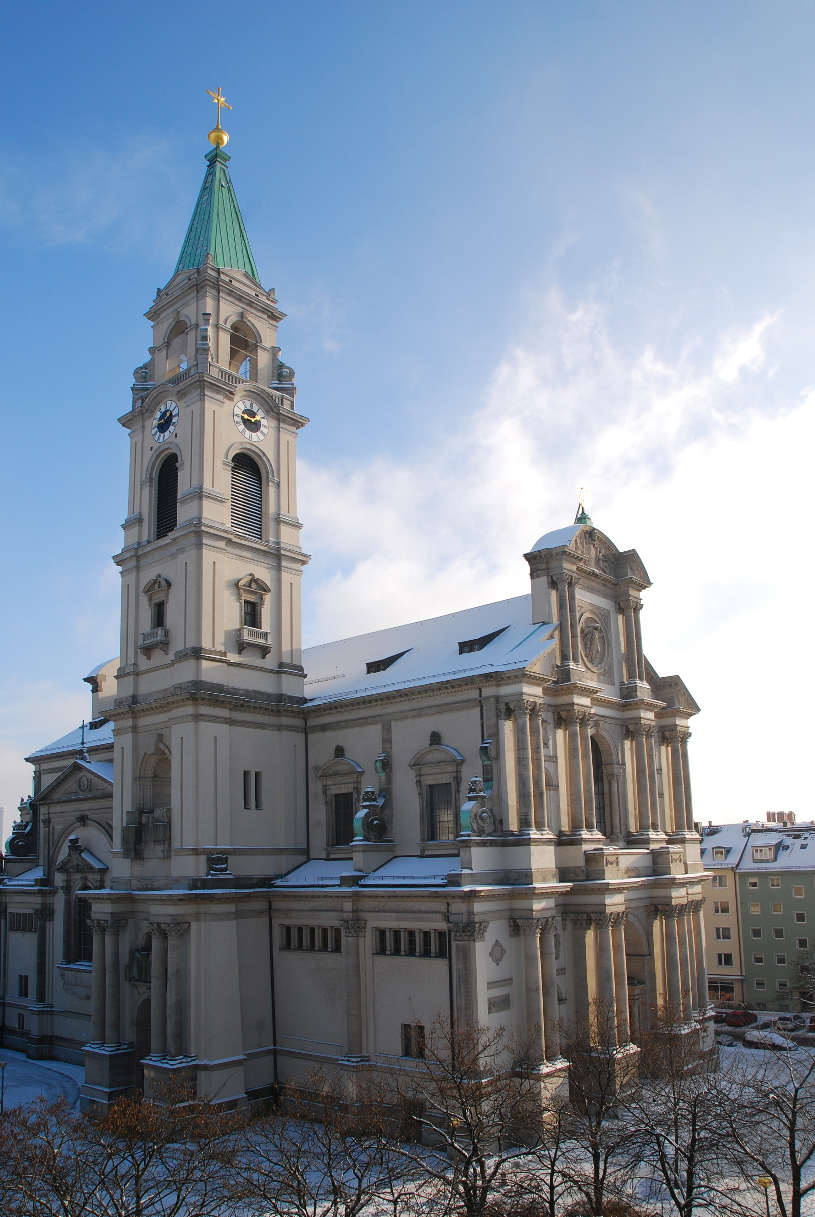 Aussenansicht der Stadtpfarrkirche St. Margaret München Sendling